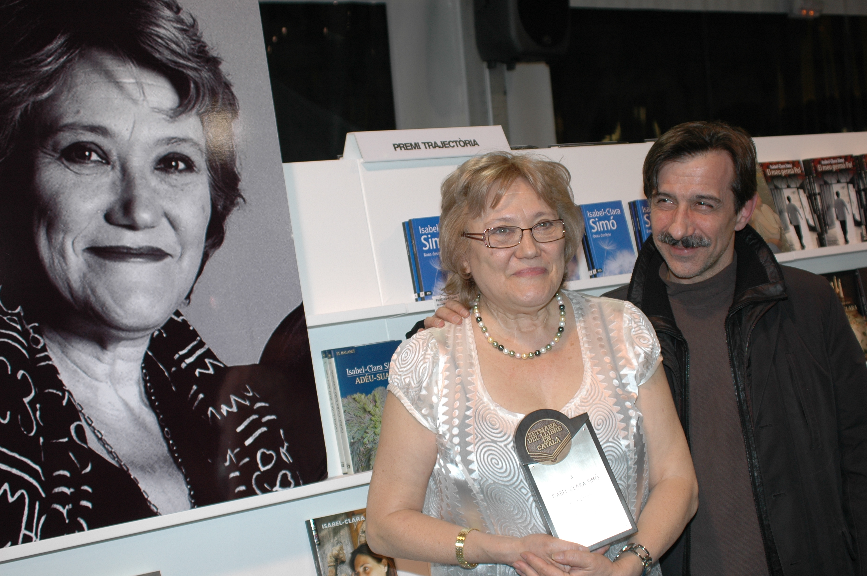 Isabel-Clara Simó i Jordi Buixaderas